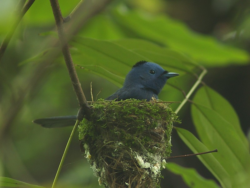 Hypothymis azurea, Male, Taipei Botanical Garden, 2008.